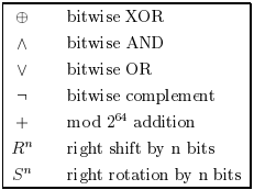 Монгол: 2tiinVildel